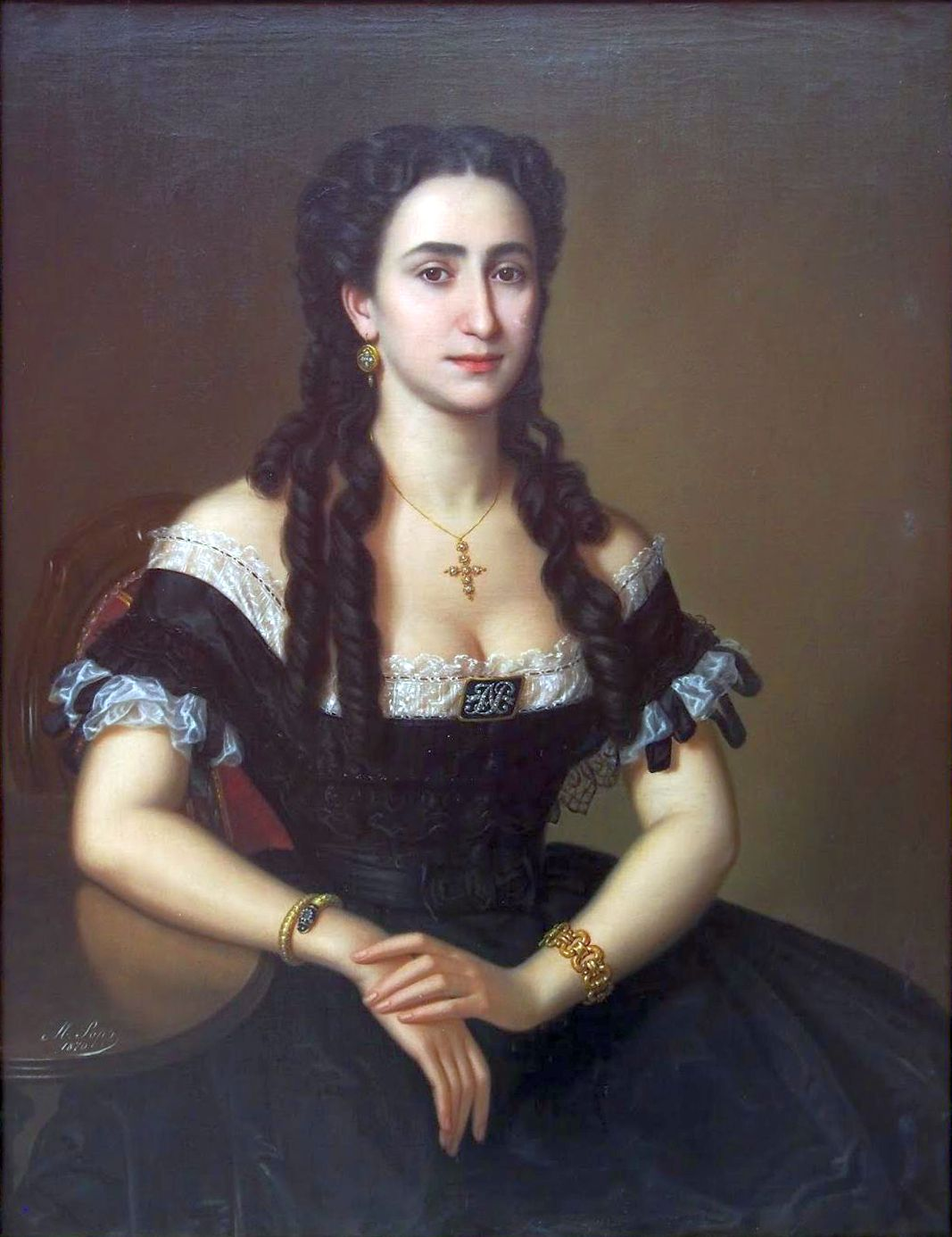 Portretul Anastasiei Rudeanu